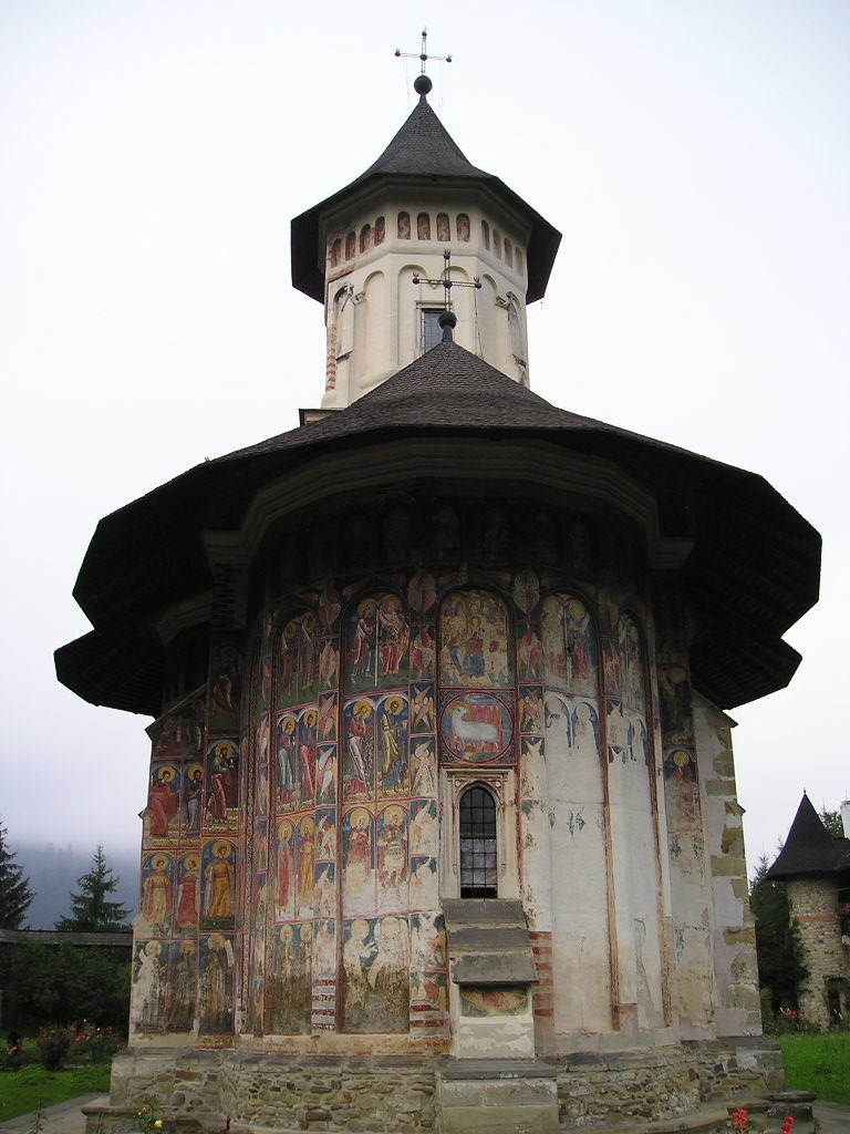 Monasterios de Bucovina.